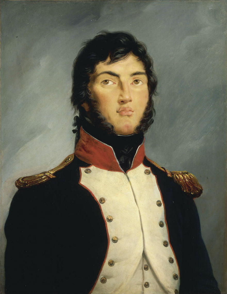 Commandé par Louis-Philippe pour le musée historique de Versailles en 1834